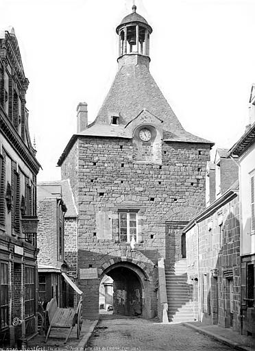 Remparts de Montfort-sur-Meu : la porte Saint-Nicolas en 1884. Photographie de Séraphin-Médéric Mieusement.